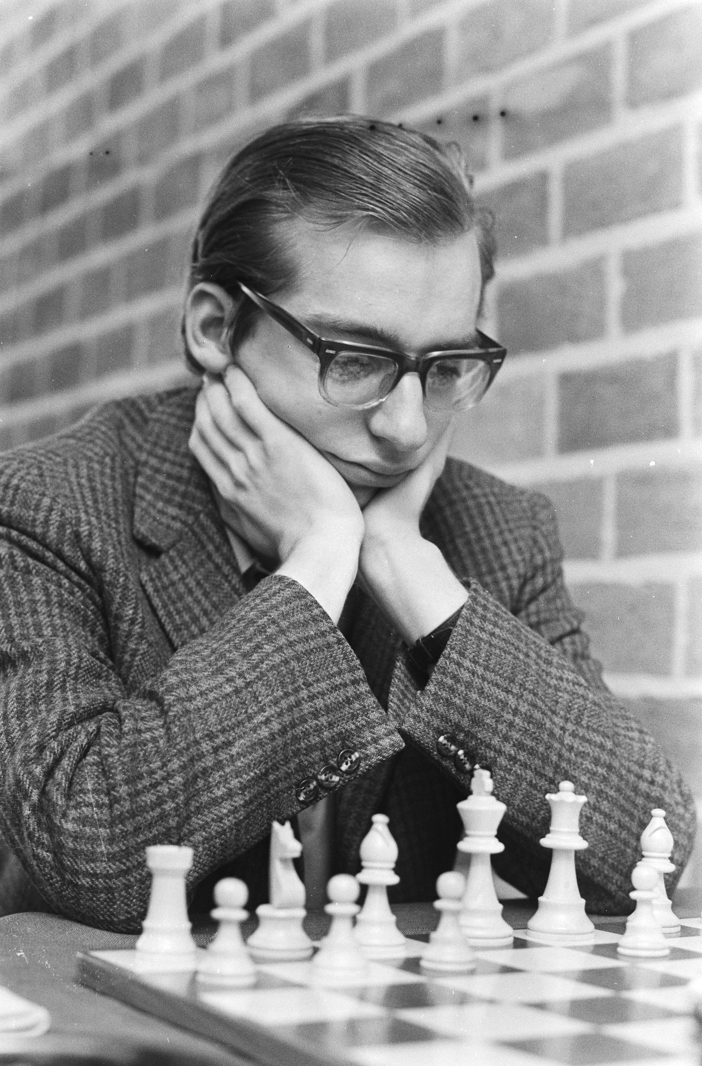 Collectie / Archief : Fotocollectie Anefo Reportage / Serie : [ onbekend ] Beschrijving : Hoogovenschaaktoernooi, Wijk aan Zee ; Hubner, kop, in aktie Datum : 12 januari 1971 Locatie : Noord-Holland, Wijk aan Zee Trefwoorden : schaken Persoonsnaam : Hubner Fotograaf : Verhoeff, Bert / Anefo Auteursrechthebbende : Nationaal Archief Materiaalsoort : Negatief (zwart/wit) Nummer archiefinventaris : bekijk toegang 2.24.01.05 Bestanddeelnummer : 924-1687